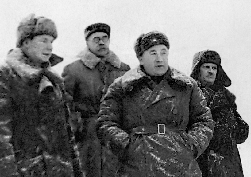 Мальцев Михаил Митрофанович, Фомин Яков Яковлевич Transliteration: Mal'cev Mihail Mitrofanovich, Fomin Jakov Jakovlevich